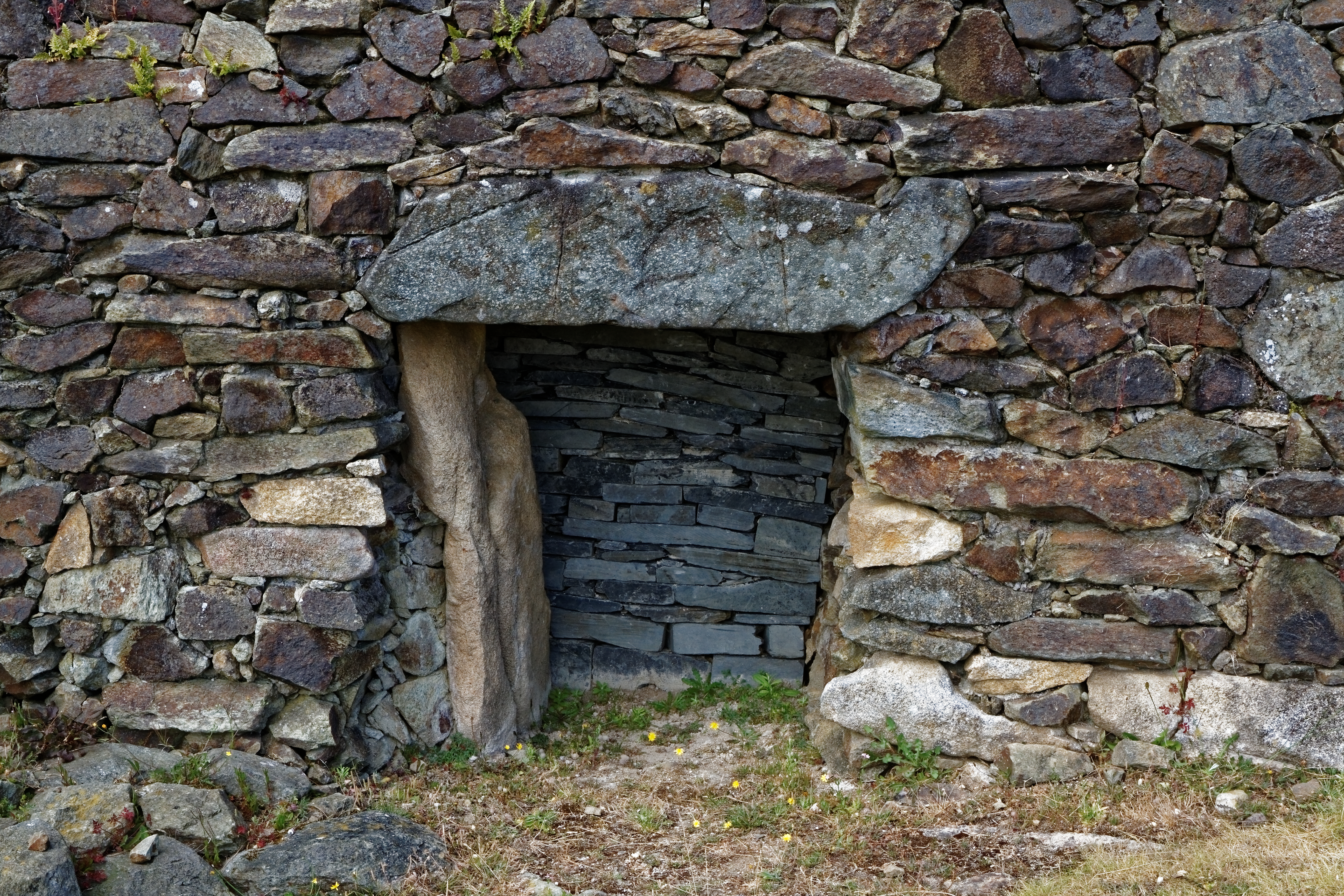 Panorama du Cairn de Barnenez à Plouezoc'h dans le Finistère. .